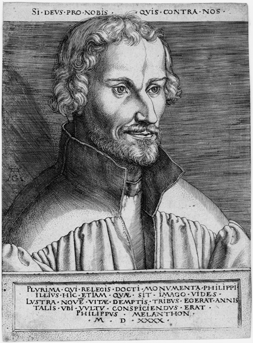 Heinrich Aldegrever: Bildnis Philip Melanchthon, Kupferstich nach Lucas Cranach, 17,2 x 12,7 cm, 1540